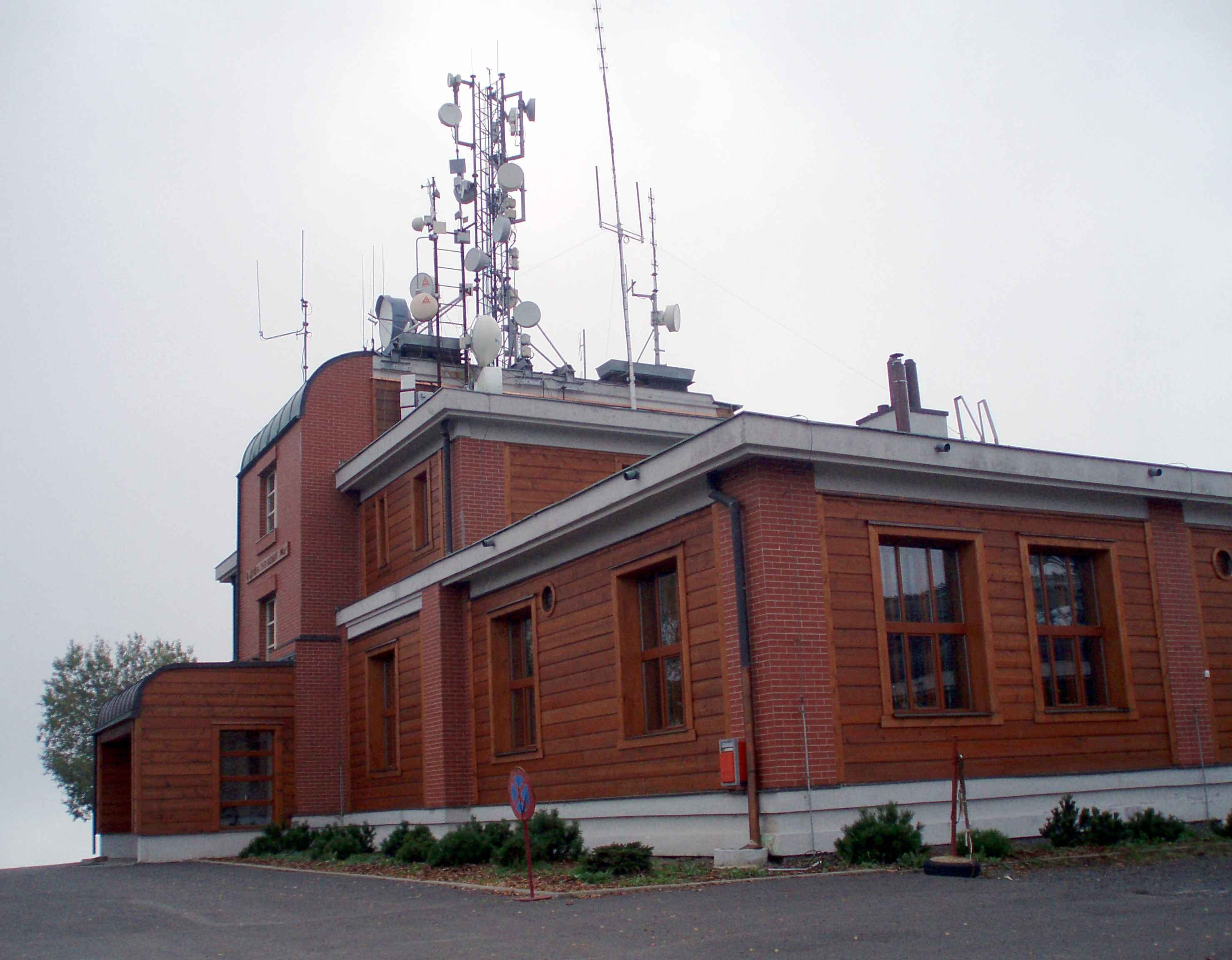 Baude auf dem Kosakow